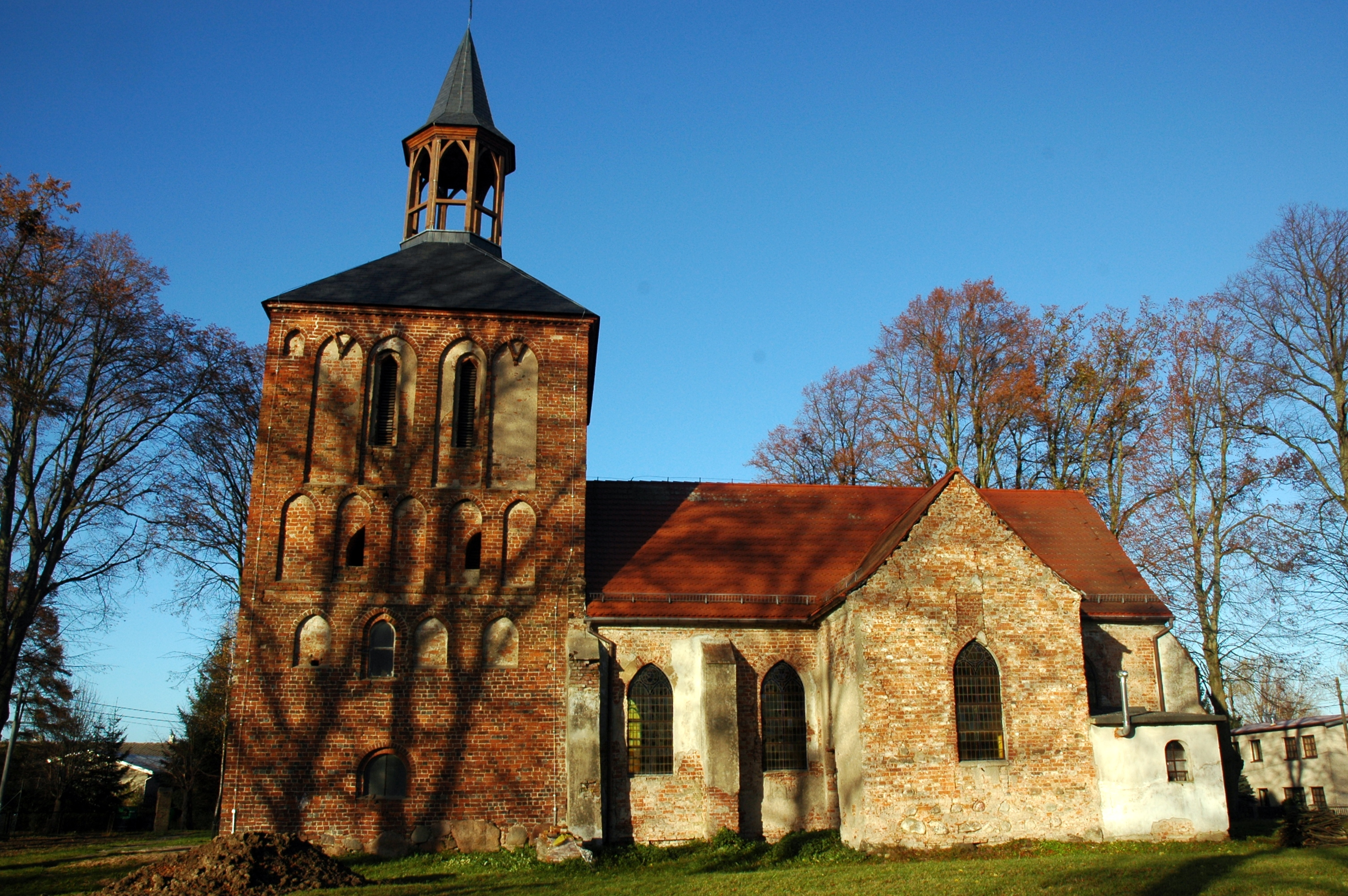 Kościół Wniebowzięcia Najświętszej Marii Panny w Czerninie (woj. zachodniopomorskie)